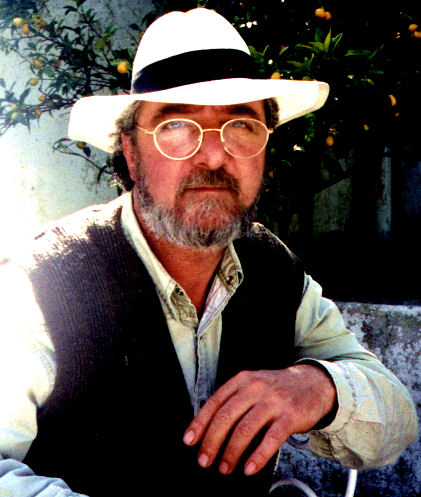 Sergio Rubino, pittore, ceramista, scultore italiano